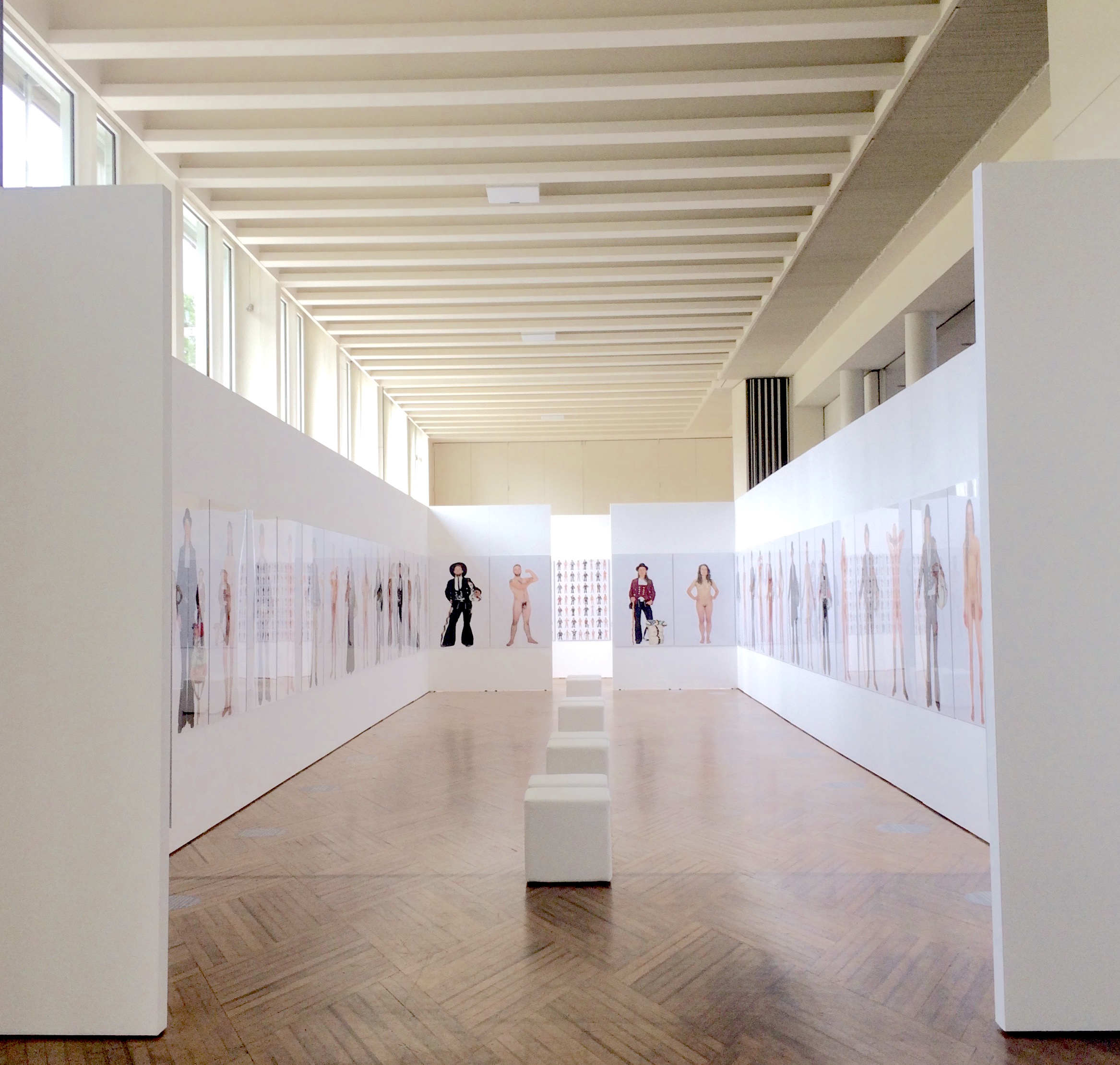 Blick in die Fotokunst-Ausstellung Kluft & Haut von Benjamin Reding in Zusammenarbeit mit dem saarl. Kultusministerium in der ehem. französischen Botschaft in Saarbrücken am Tag der Eröffnung am 9.August 2019